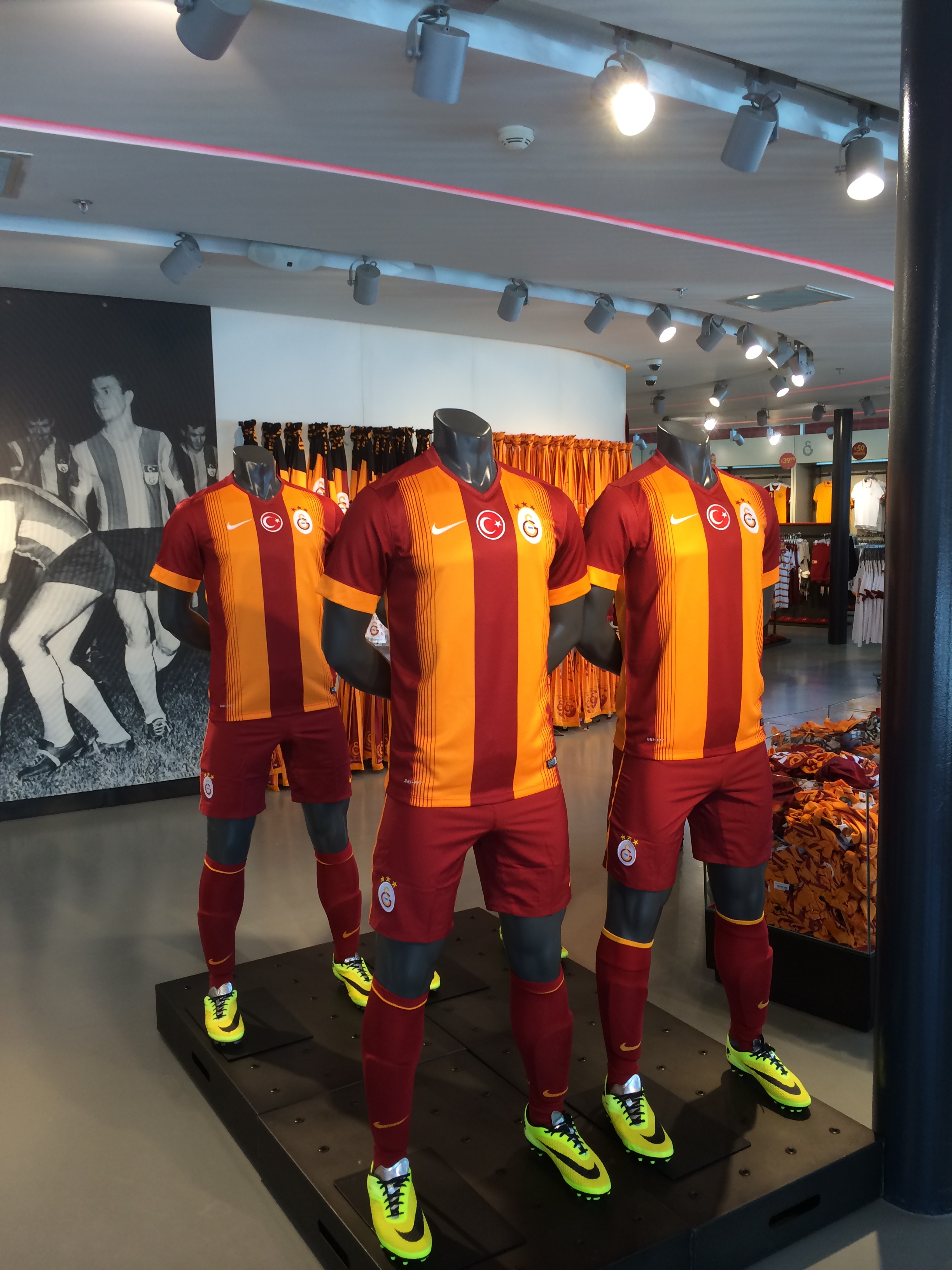 Galatasaray 2014-15 (h) kits